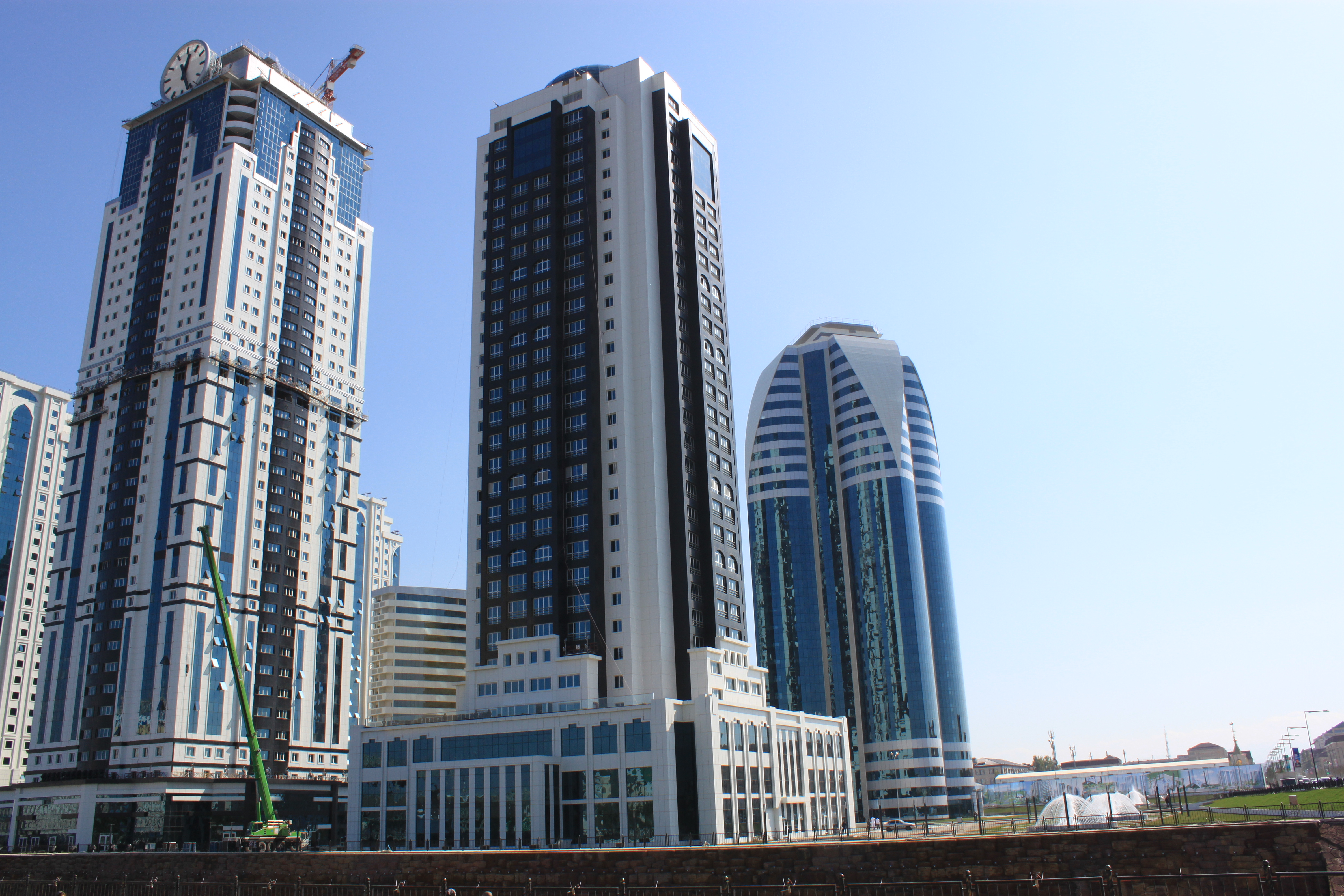 Чечня Грозный-сити